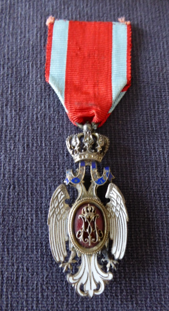 Suite à sa démonstration de vol. Pierre 1er de Serbie détacha cette médaille de la poitrine de son aide de camp pour la remettre à Georges Bellenger.